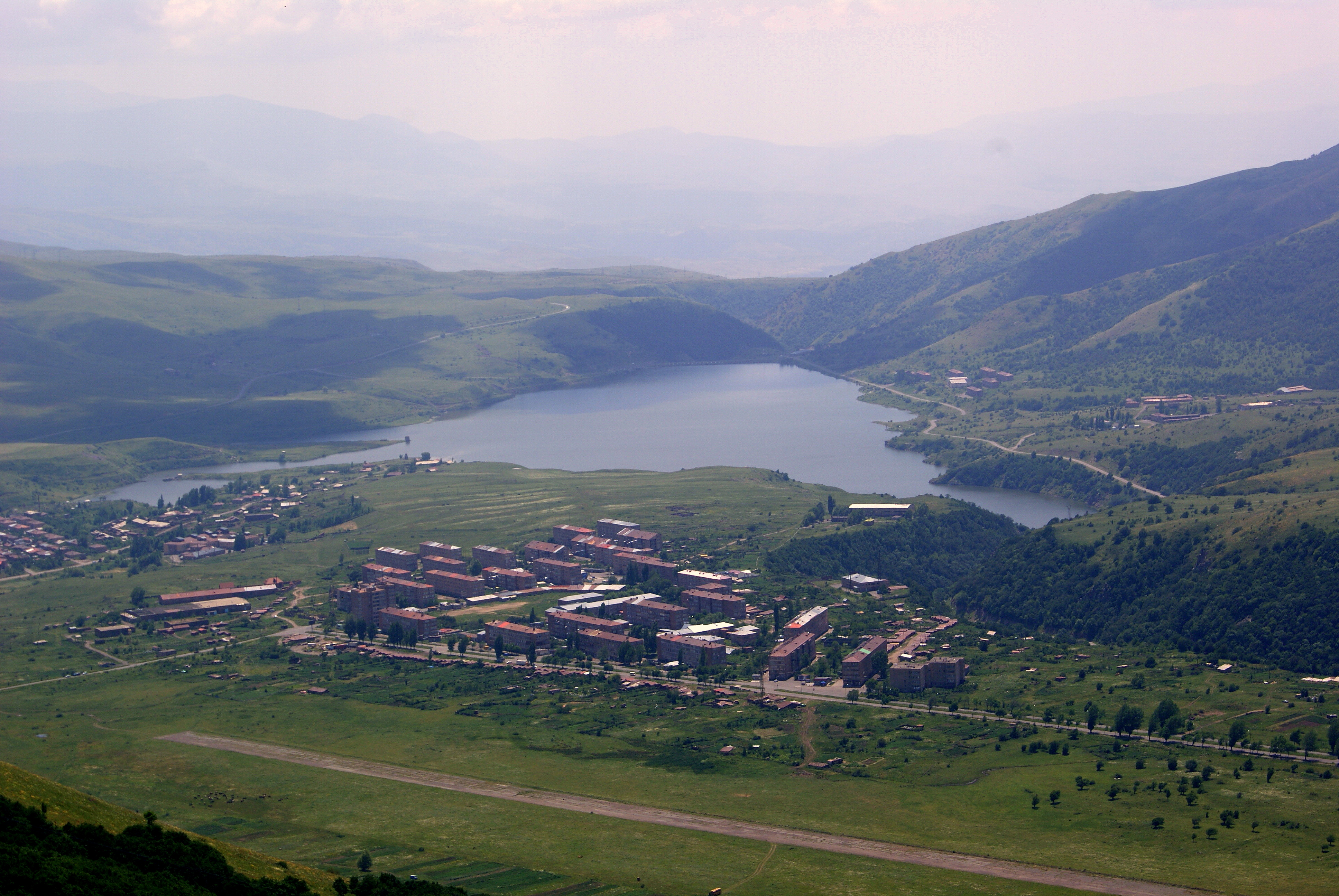 Ջերմուկի ջրաբանական արգելավայր, Կեչուտի ջրամբար